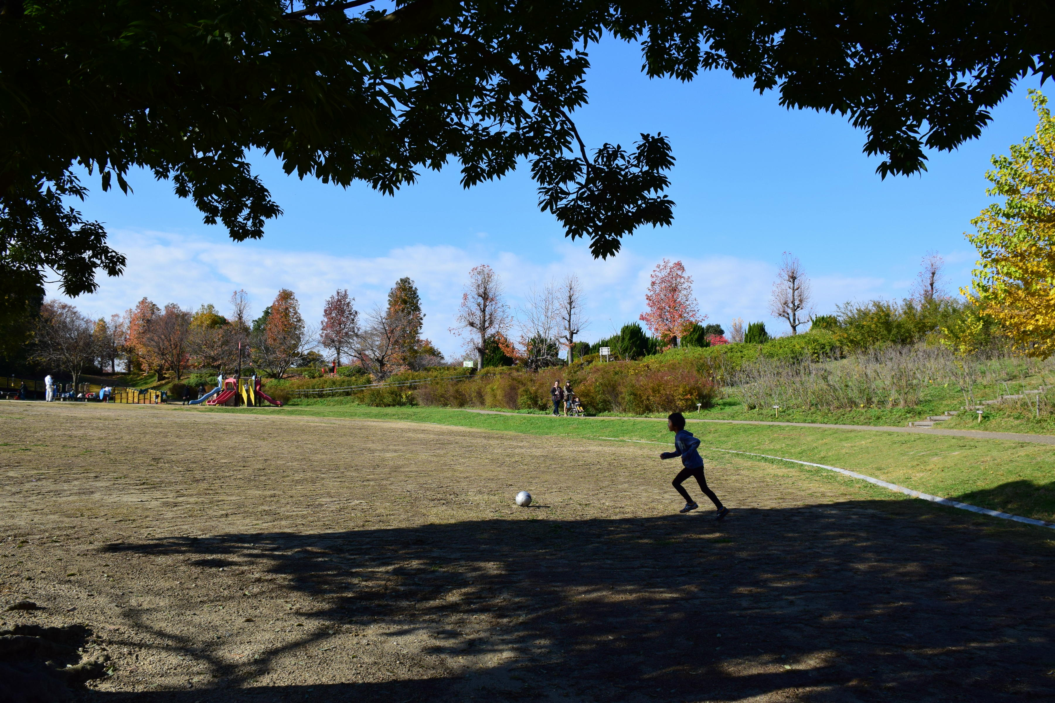 大高緑地公園